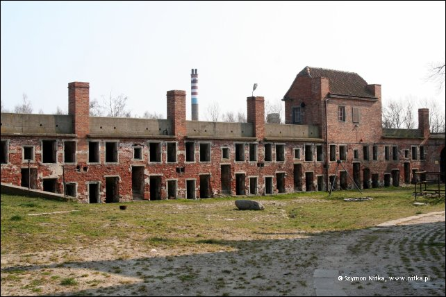 More: .